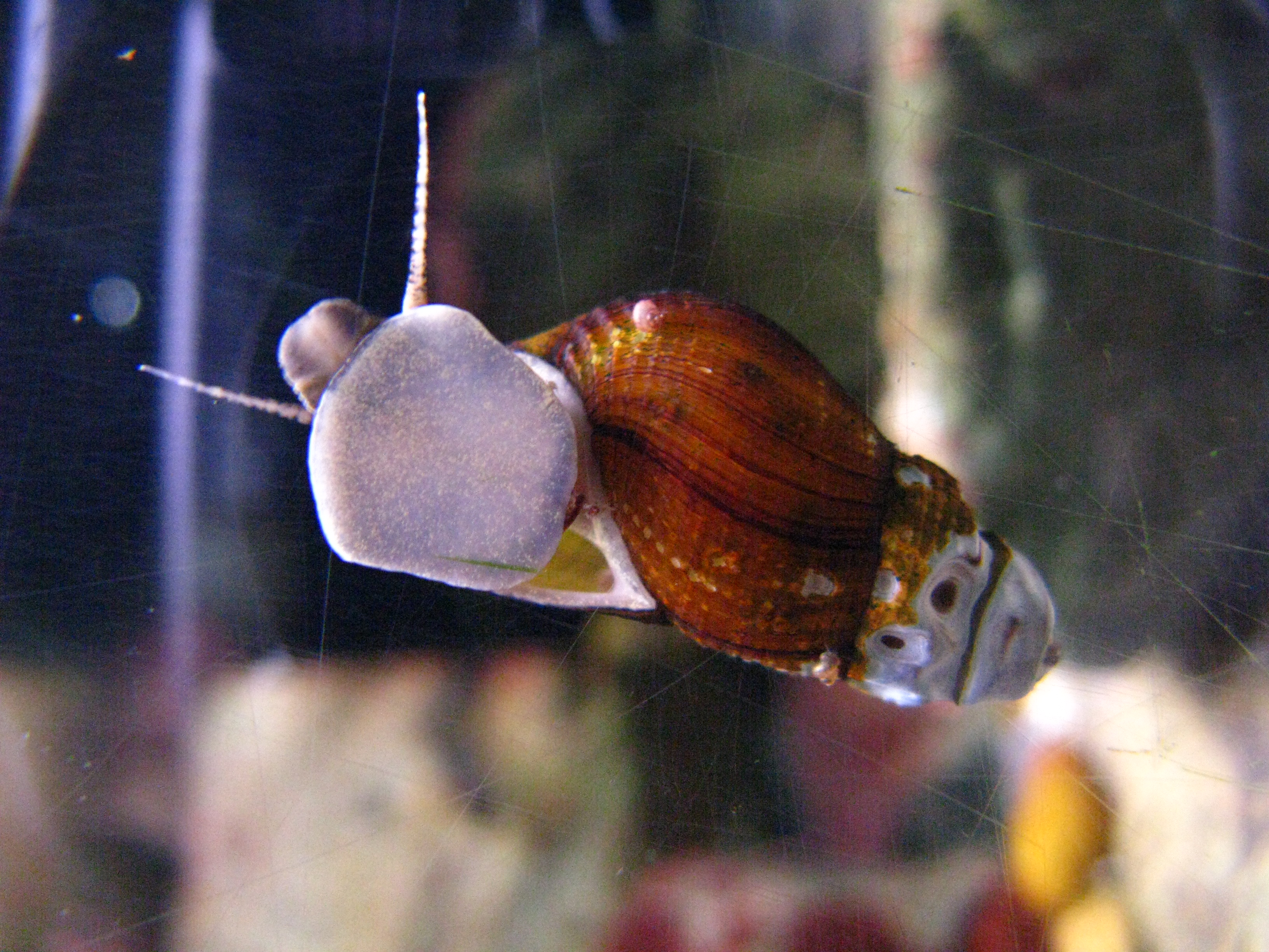 Scientific name Semisulcospira kurodai